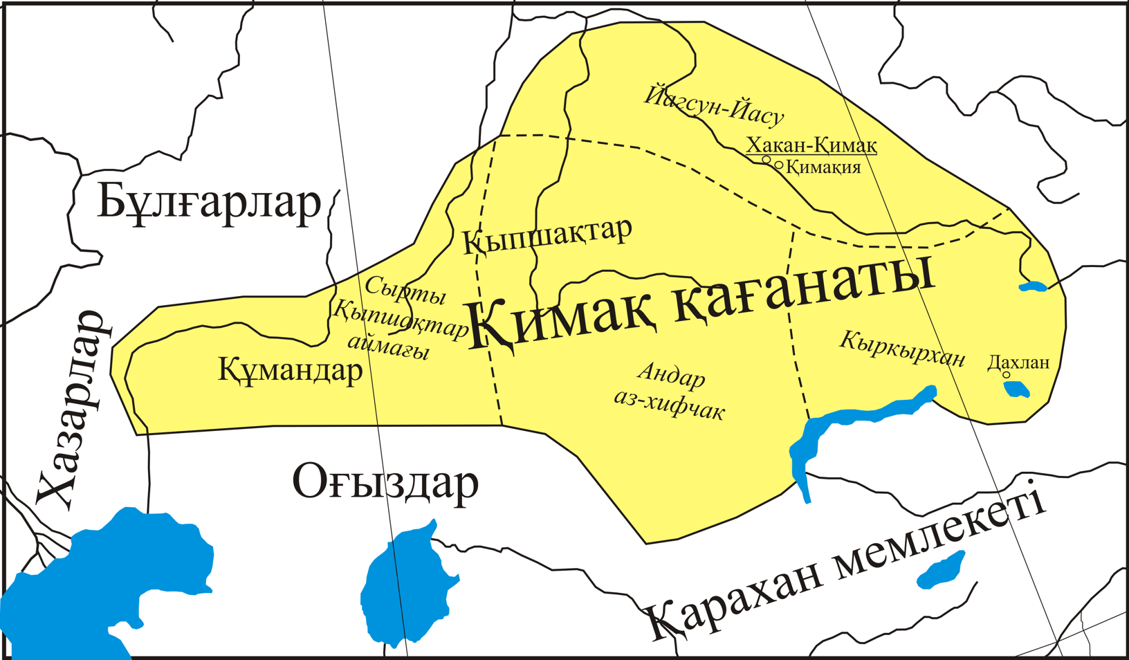 Қимақ мемлекетінің картасы